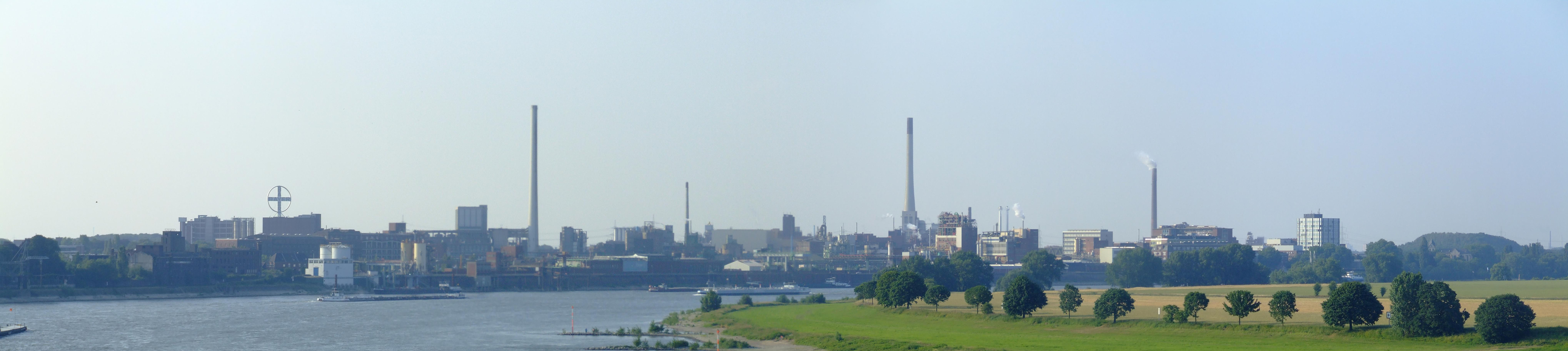 Chempark in Uerdingen (noch mit Bayer-Kreuz) - Ansicht von der Uerdinger Rheinbrücke